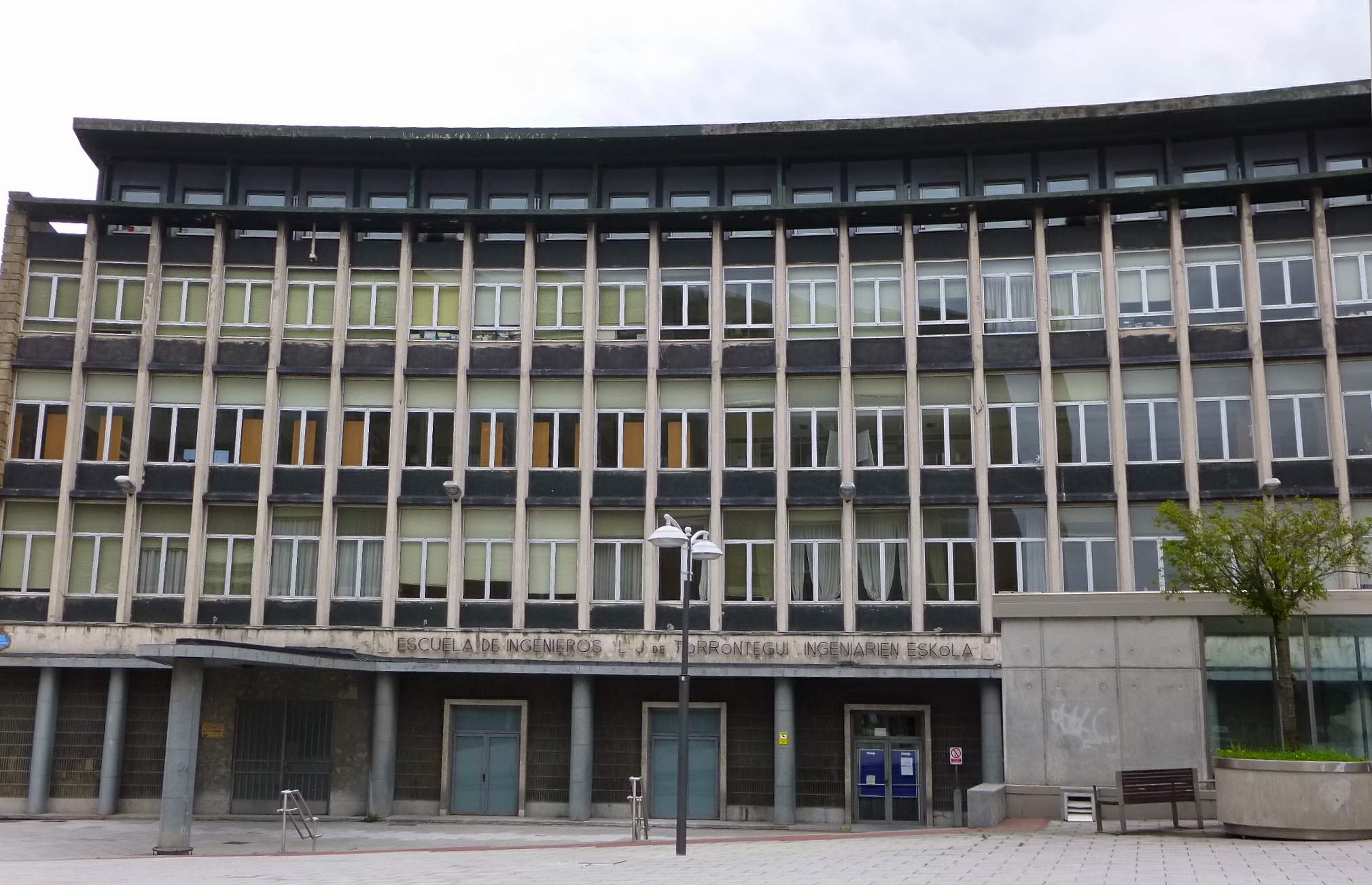 Escuela Técnica Superior de Ingeniería de Bilbao (ETSIB, UPV-EHU), Edificio D (1960)